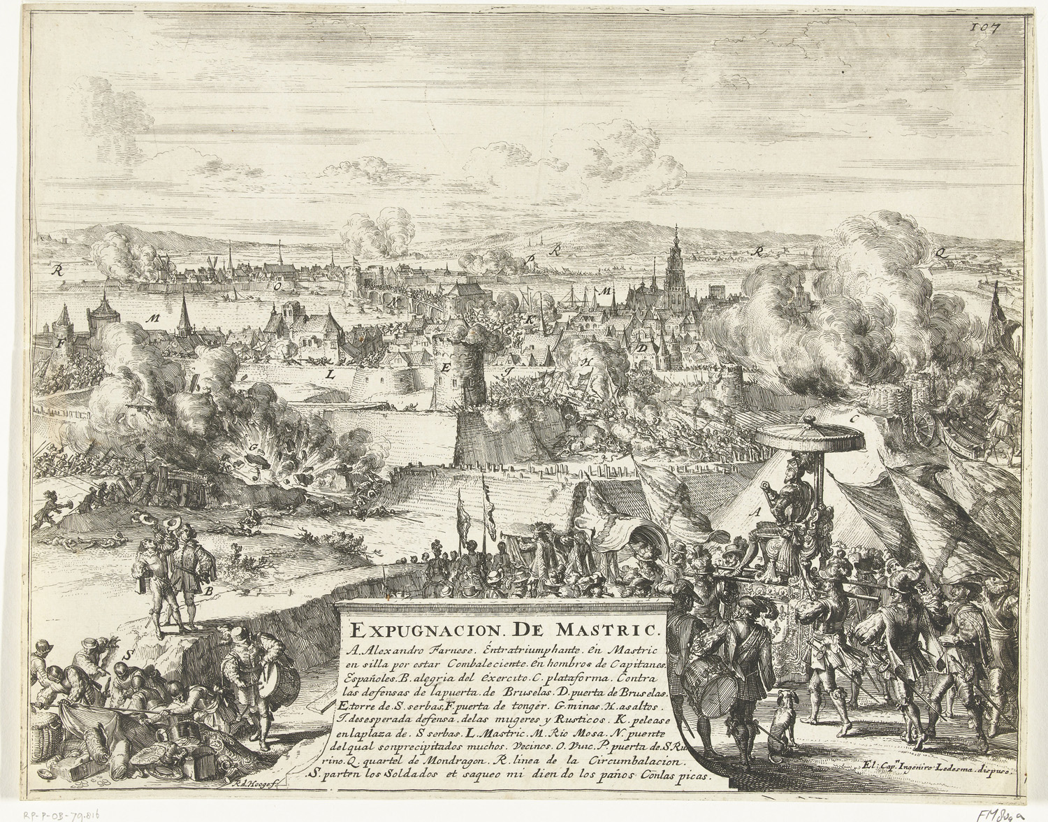 Inname van Maastricht door de hertog van Parma, 1579, Romeyn de Hooghe, 1670 - 1699